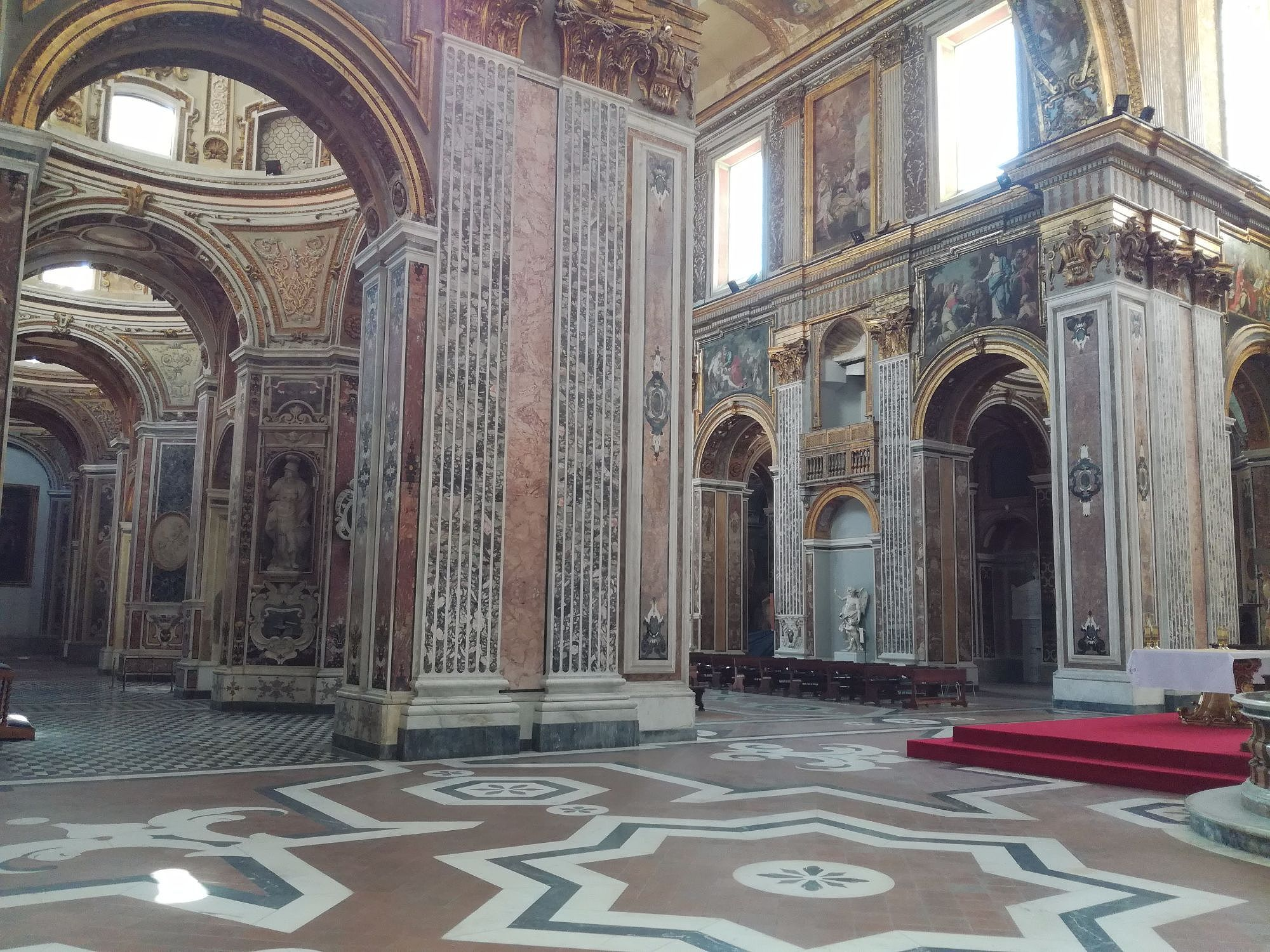 Vista dal transetto sinistro (San Paolo Maggiore)